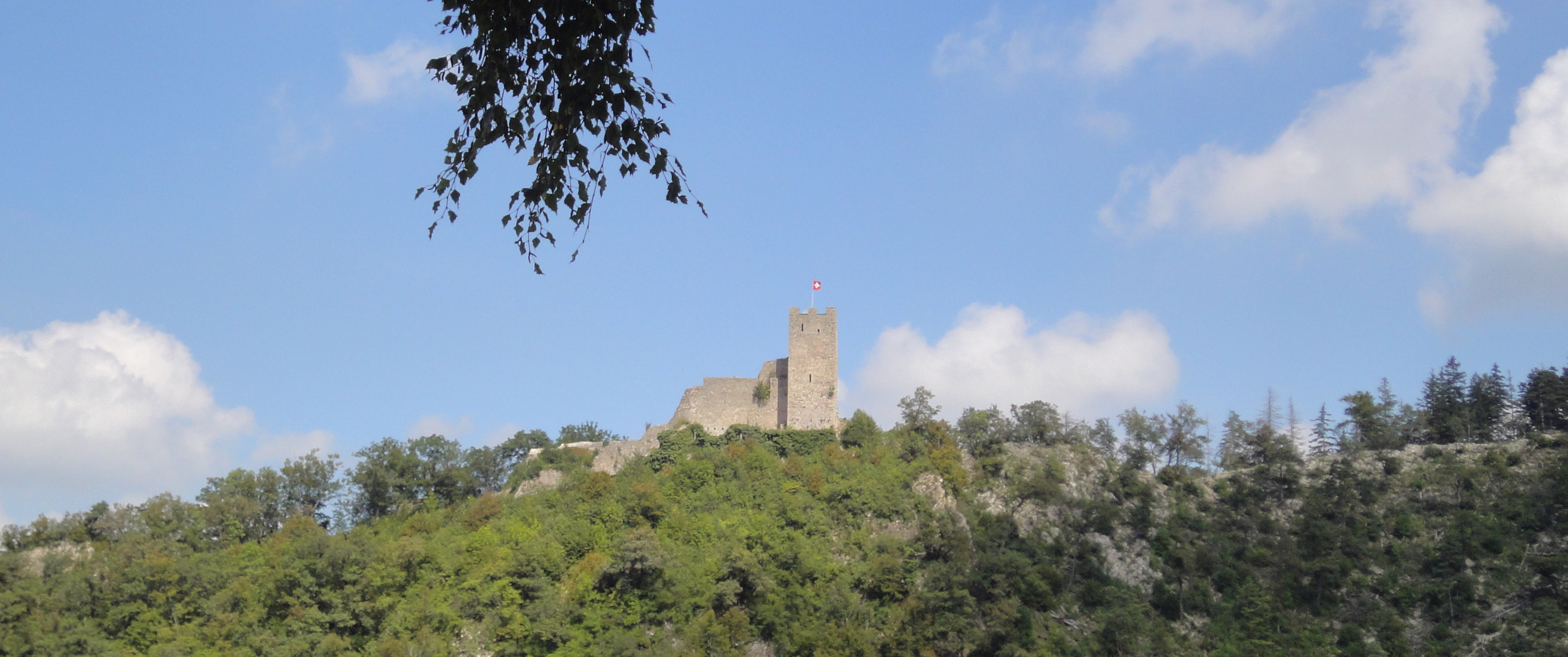 Ruine Waldenburg